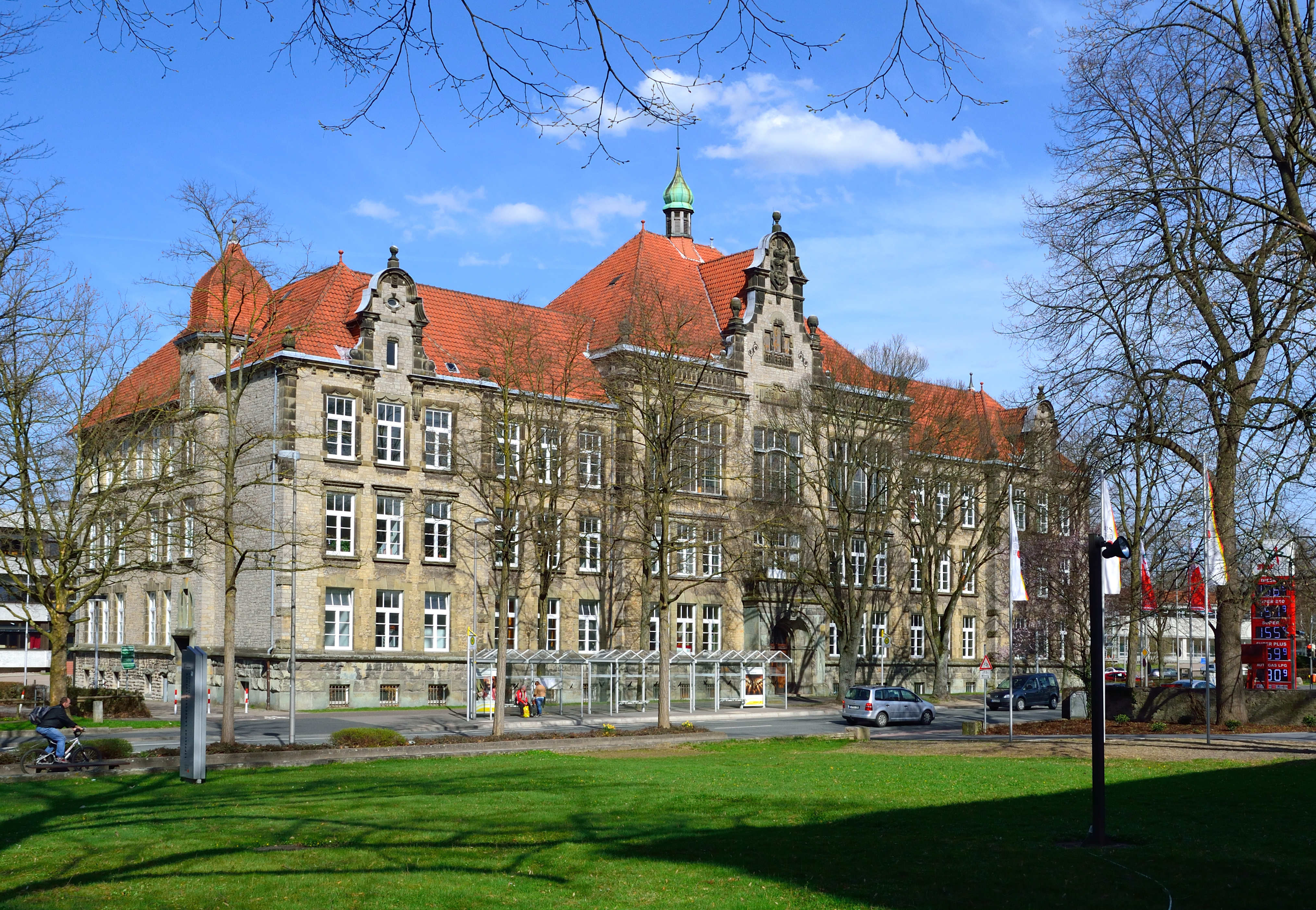 This is a photograph of an architectural monument. Gymnasium Leopoldinum